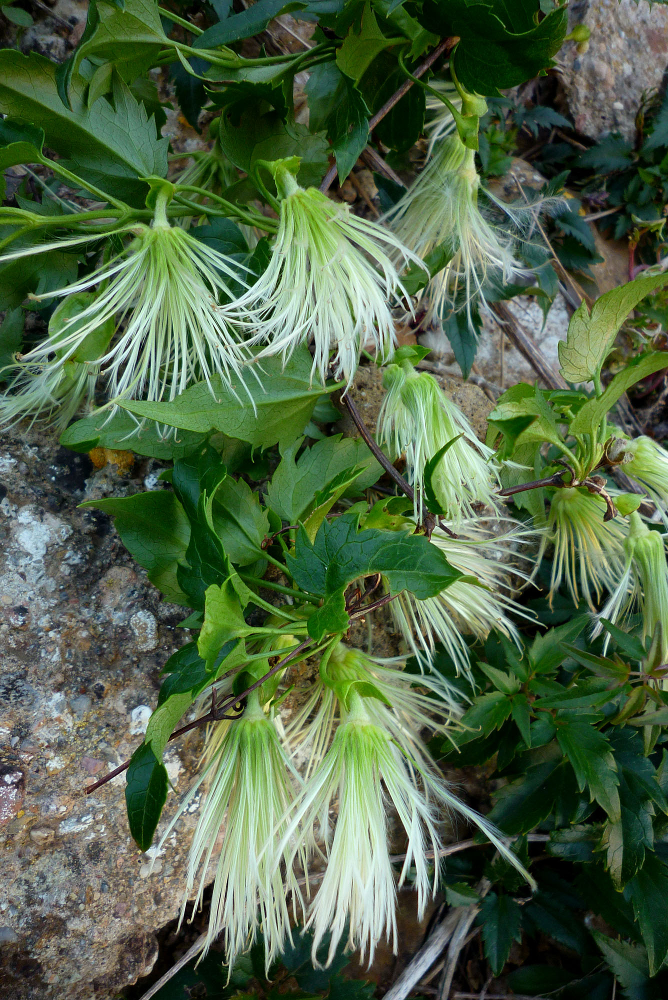 Clematis cirrhosa (frutos) en La Atalaya, Cartagena, España.